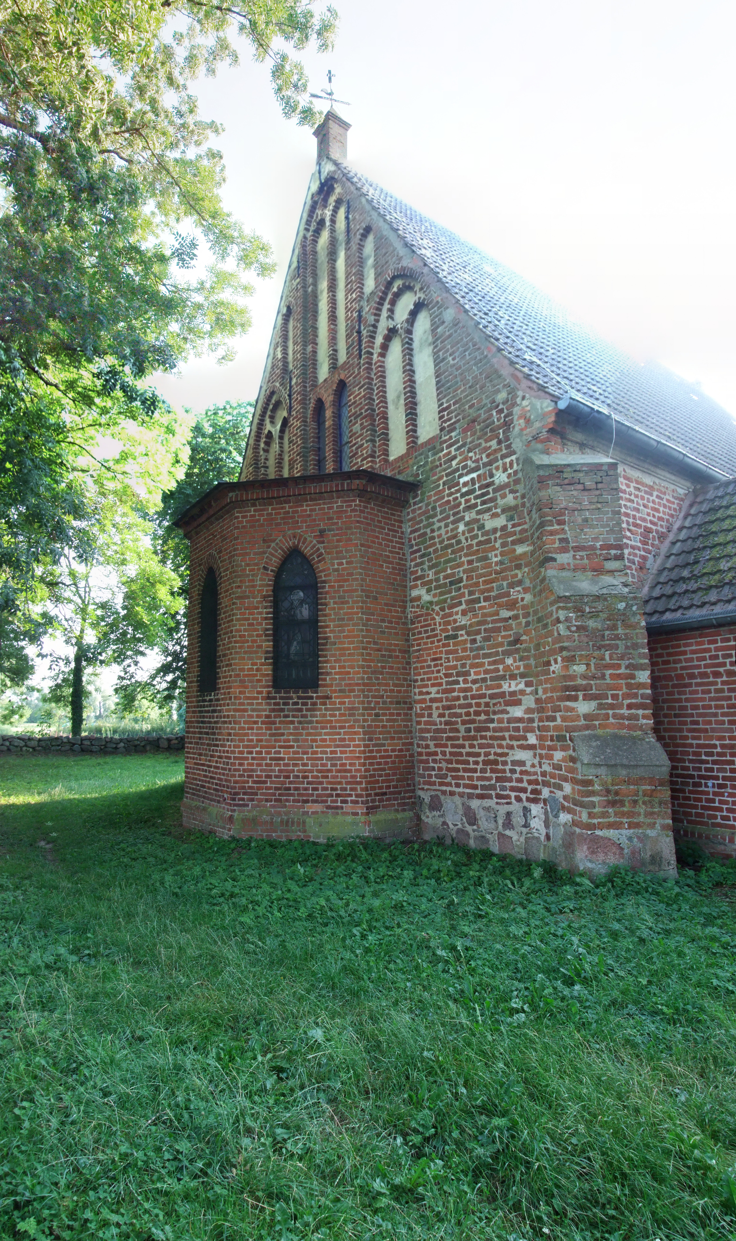 Marienkirche Netzelkow, Lütow, Deutschland